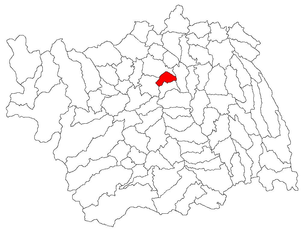 Categorie:Hărţi ale judeţului Bacău